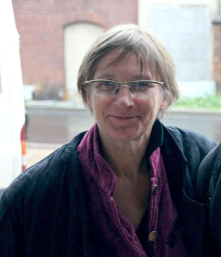 Dorota Kędzierzawska, polish director and writer.